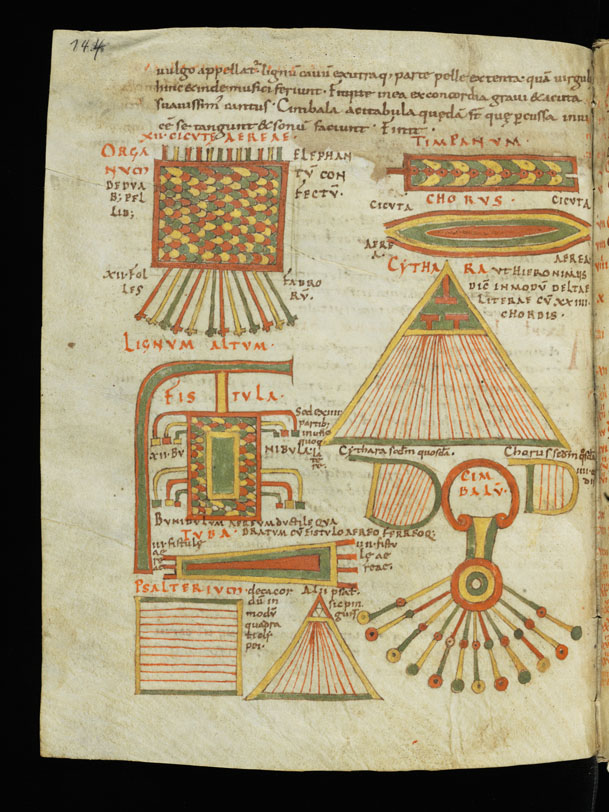 Cod. Eins. 358, Musikinstrumente, S. 144